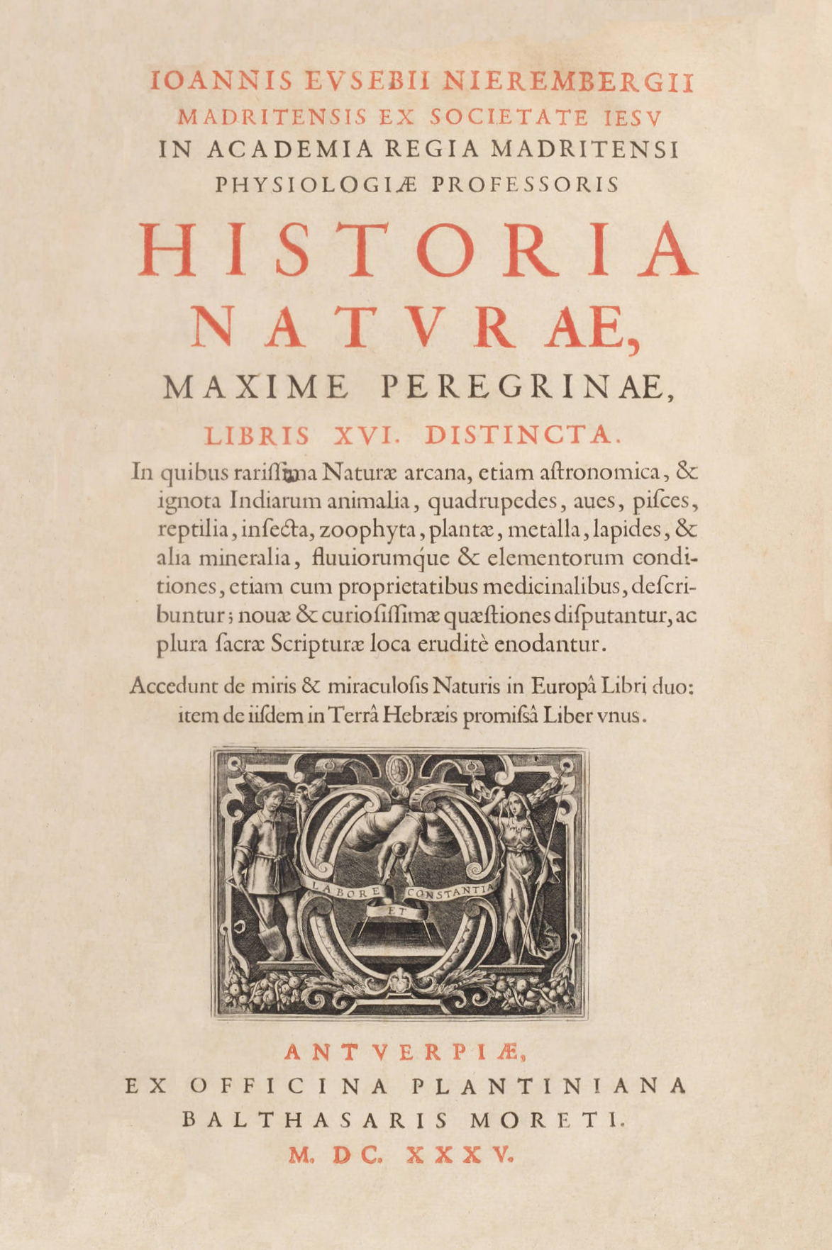 Portada del libro Historia naturae, maxime peregrinae (libro XVI). Publicado en latín por Juan Eusebio Nieremberg en Amberes, en 1635.